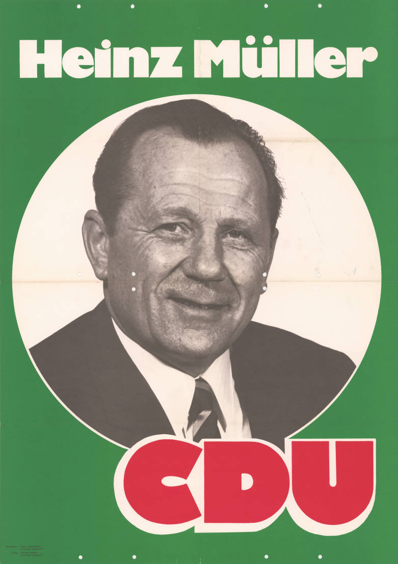 Heinz Müller CDUAbbildung:PorträtfotoPlakatart:Kandidaten-/Personenplakat mit PorträtAuftraggeber:CDU in Niedersachsen, HannoverDrucker_Druckart_Druckort:Gebrüder Jänecke, HannoverObjekt-Signatur:10-008 : 319Bestand:Landtagswahlplakate Niedersachsen (10-008)GliederungBestand10-18:Landtagswahlplakate Niedersachsen (10-008) » CDULizenz:KAS/ACDP 10-008 : 319 CC-BY-SA 3.0 DE